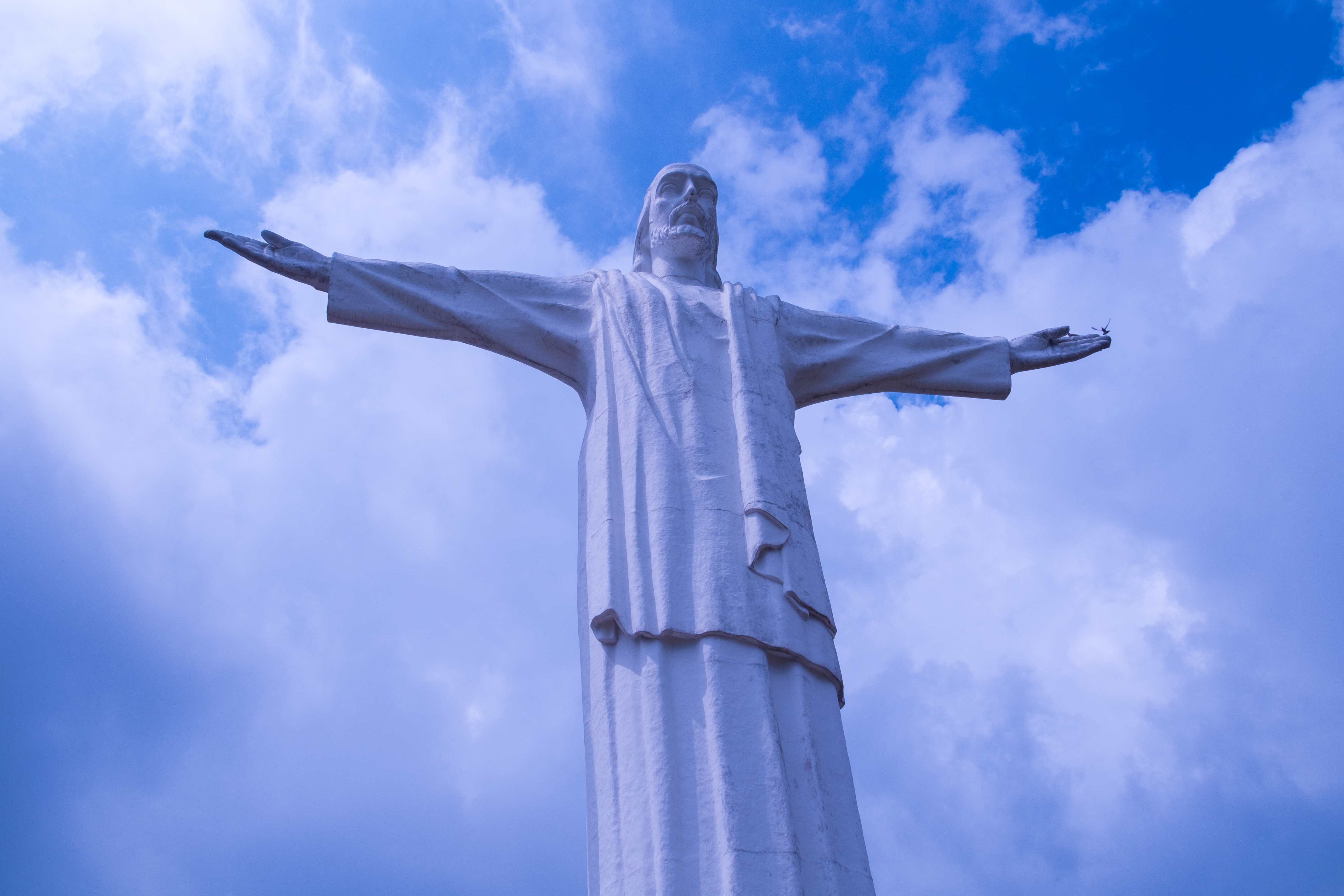 Estatua de Cristo Rey - Cali, Colombia